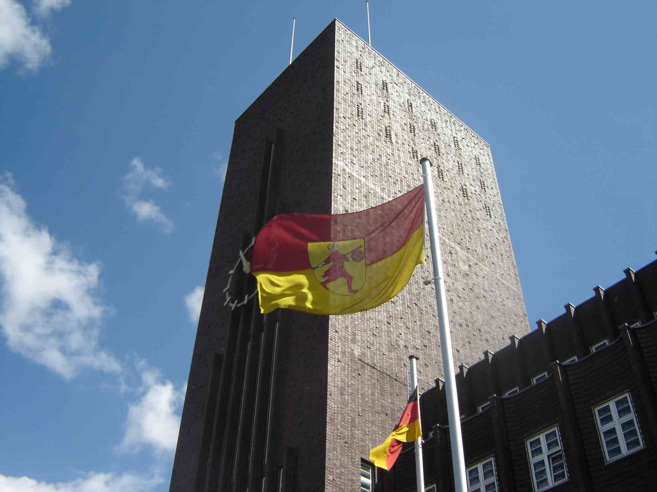 Offizielle Stadtflagge von Wilhelmshaven vor dem Rathaus der Stadt